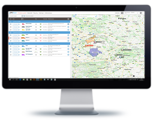 Chytrá mapa na úvodní obrazovce, interaktivní se seznamem vozidel.